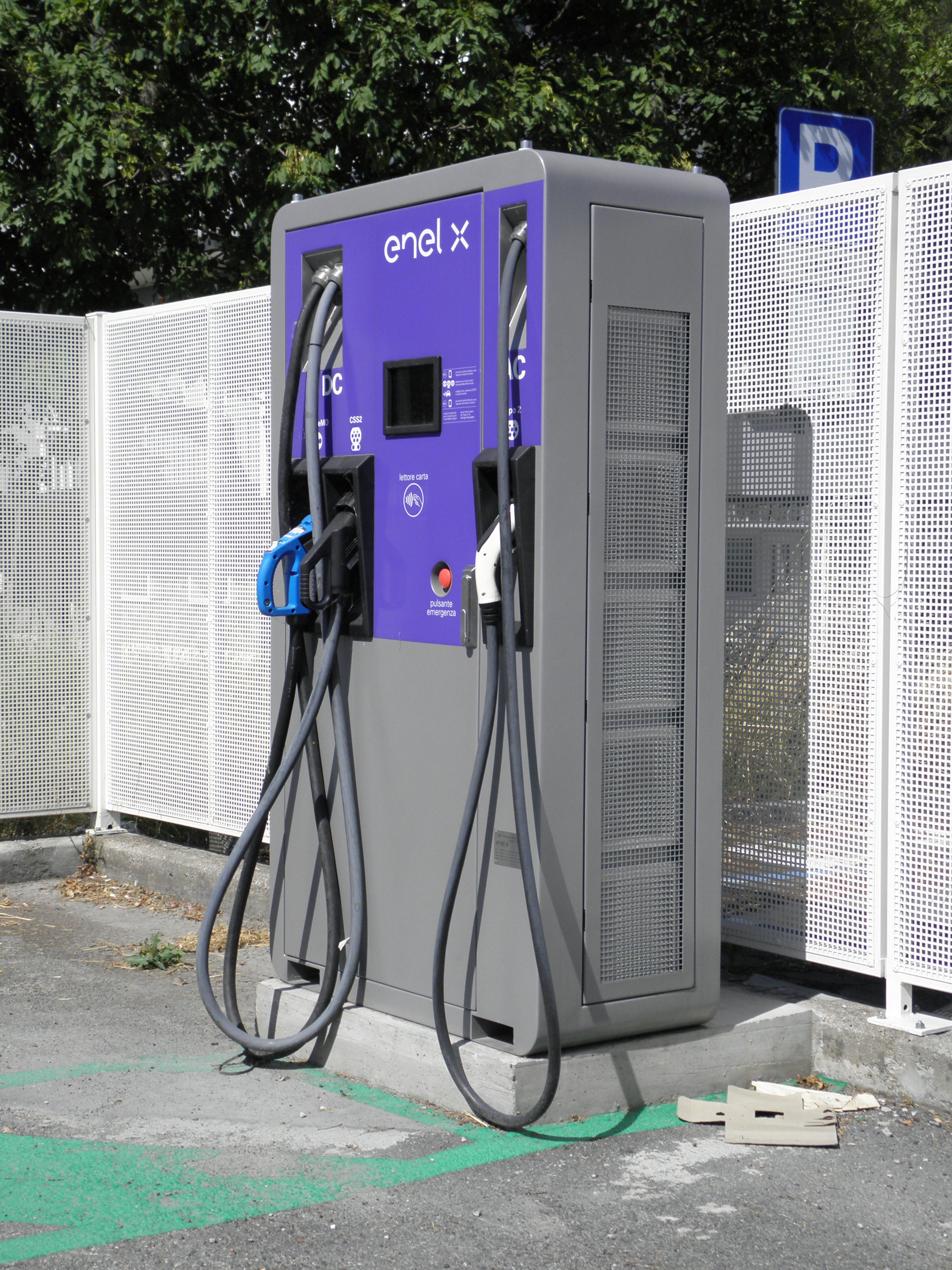 Rovigo, via Porta Adige, la colonnina di ricarica Enel X per veicoli elettrici.